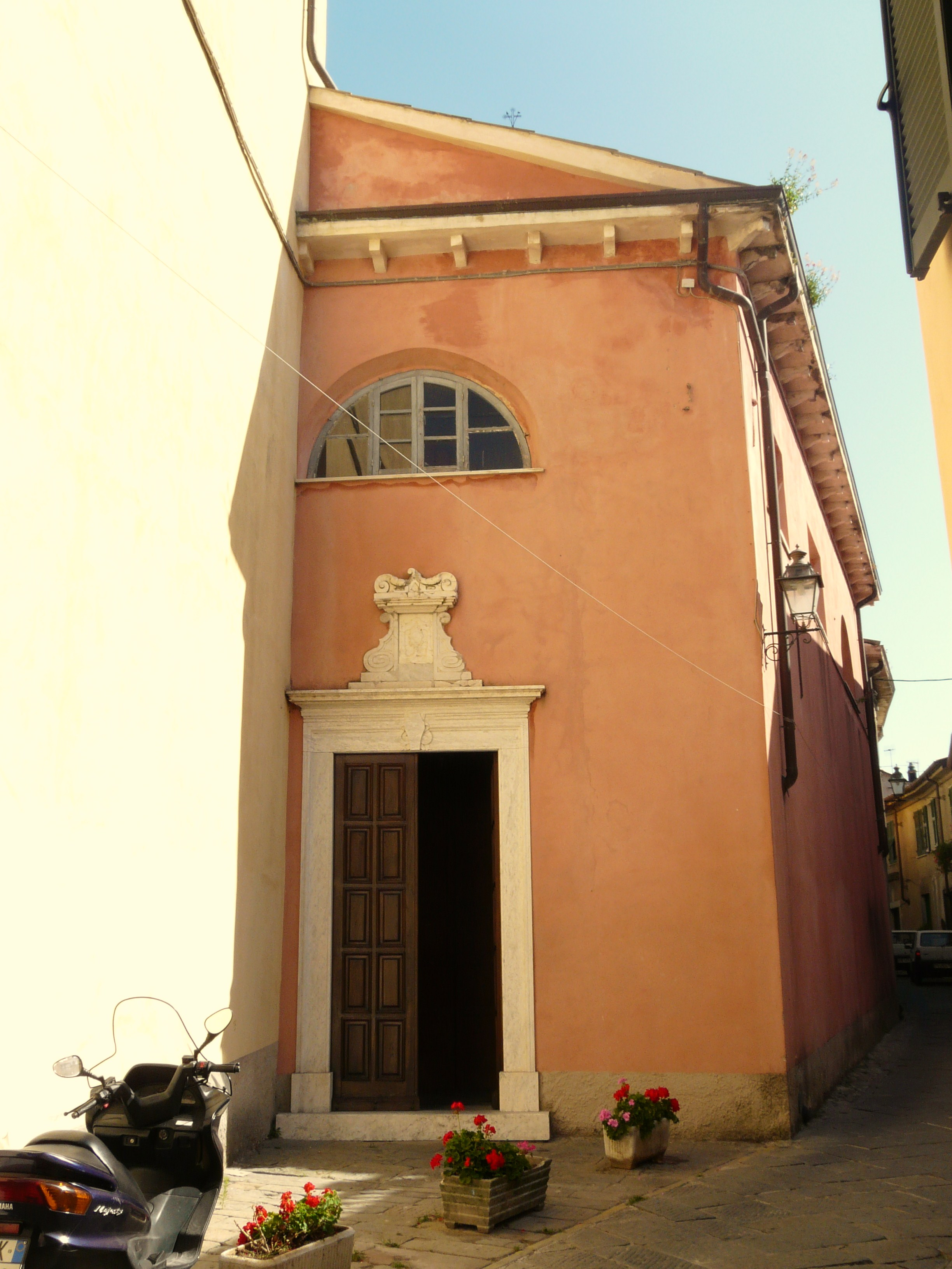 Chiesa-Santuario di San Remigio, Fosdinovo, Toscana, Italia